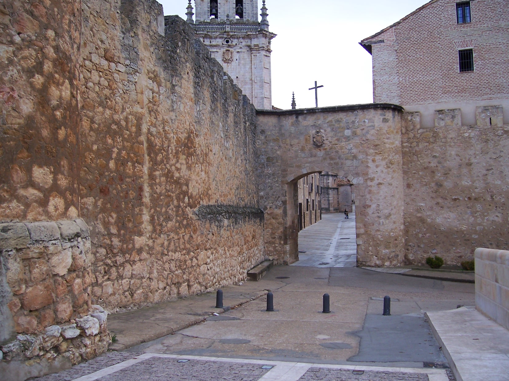 El Burgo de Osma (Soria, España). Entrada a la ciudad. Autor de la imagen: LourdesCardenal, octubre de 2005